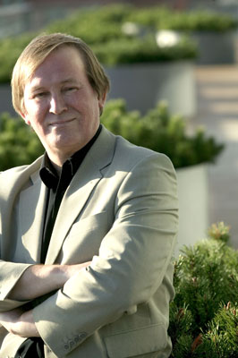 suomalainen sosiologi Matti Virtanen